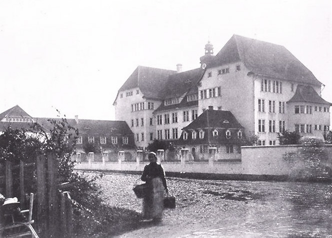 Fritz Beblo : Ecole de la Musau, près Strasbourg. Bibliothèque nationale et universitaire de Strasbourg